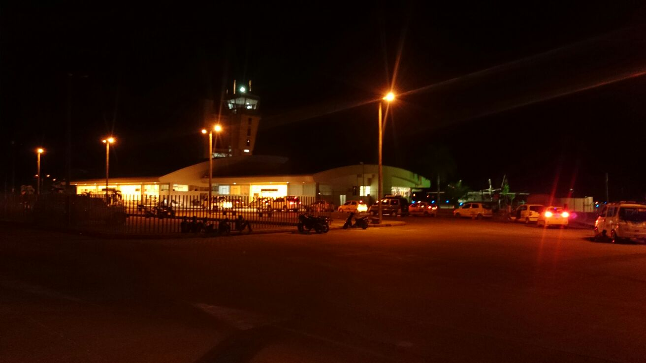 Aeropuerto el Caraño